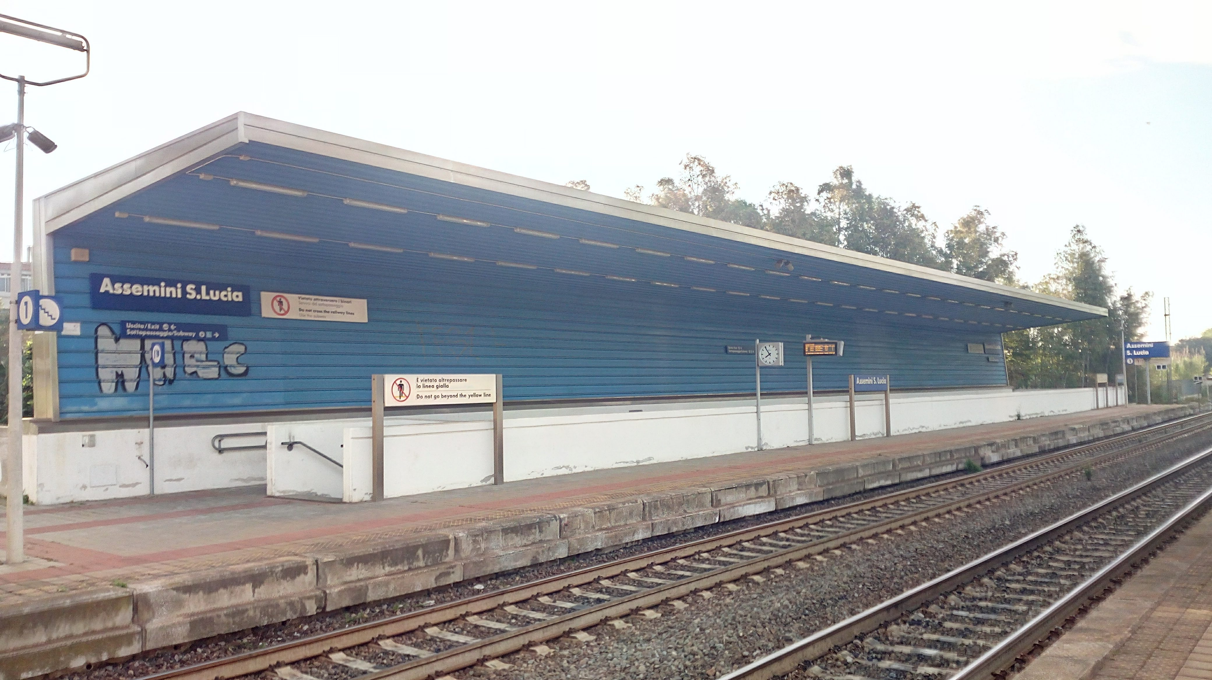 Vista del binario 1 (dal binario 2) della stazione ferroviaria di Assemini Santa Lucia.